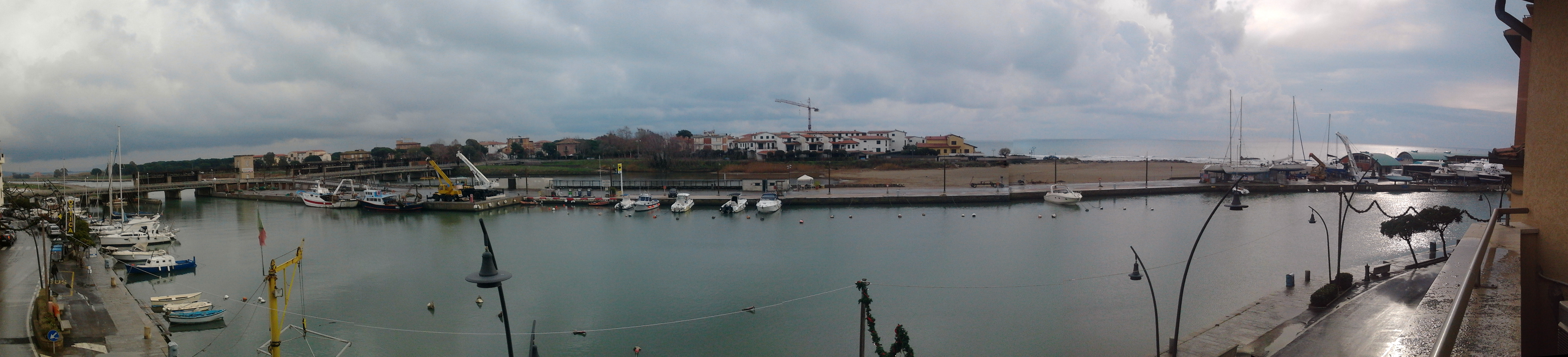 Veduta del porto di Castiglione della Pescaia a dicembre del 2011